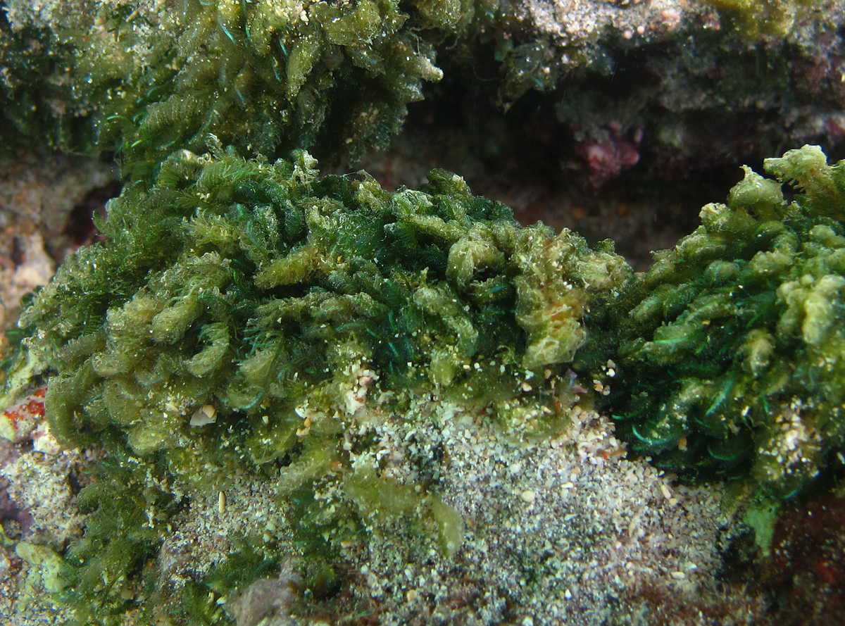 Une algue Bryopsis cf. pennata à la Réunion.